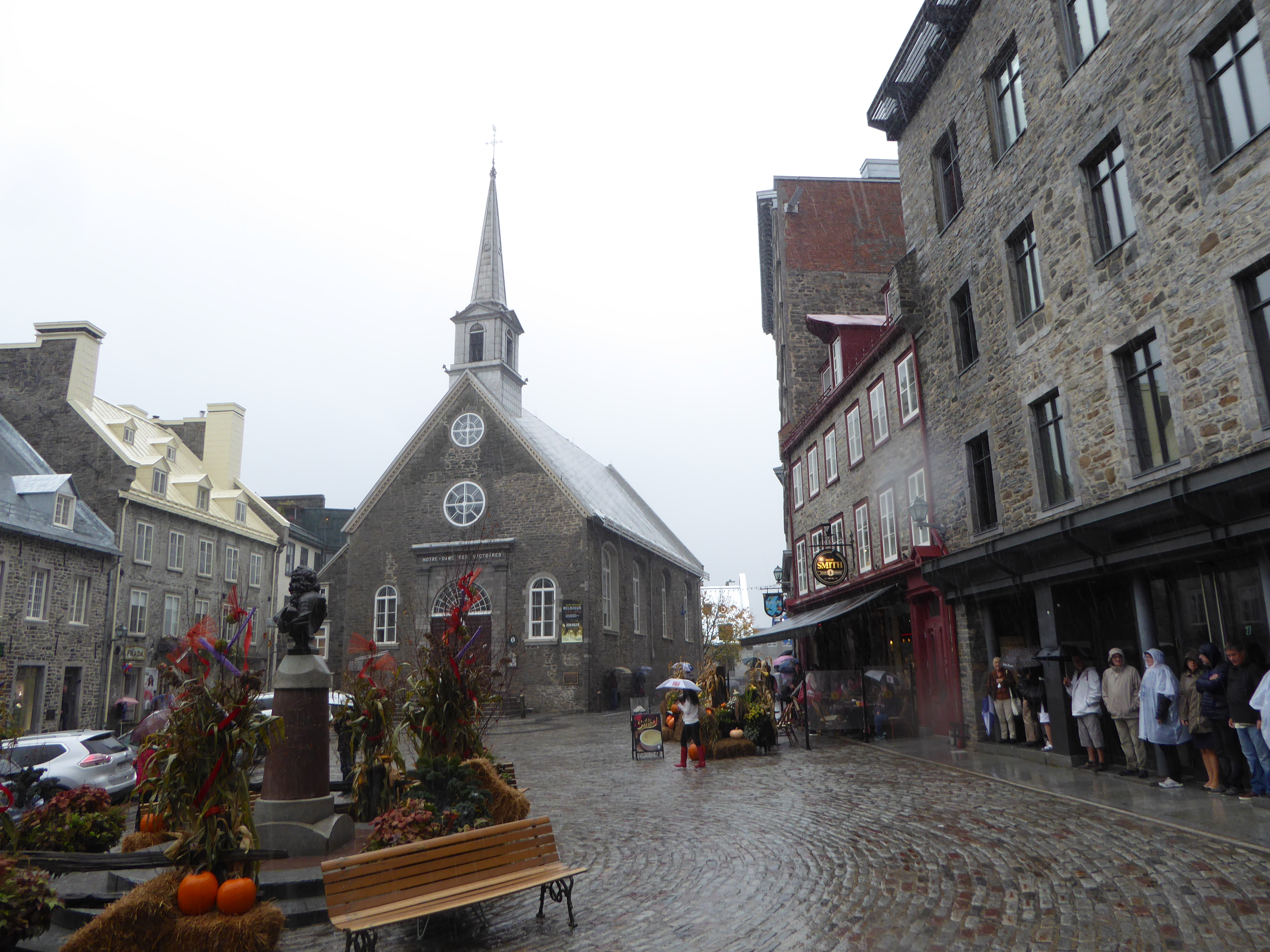 Notre-Dame-des-Victoires Quebec City, Québec, Canada.